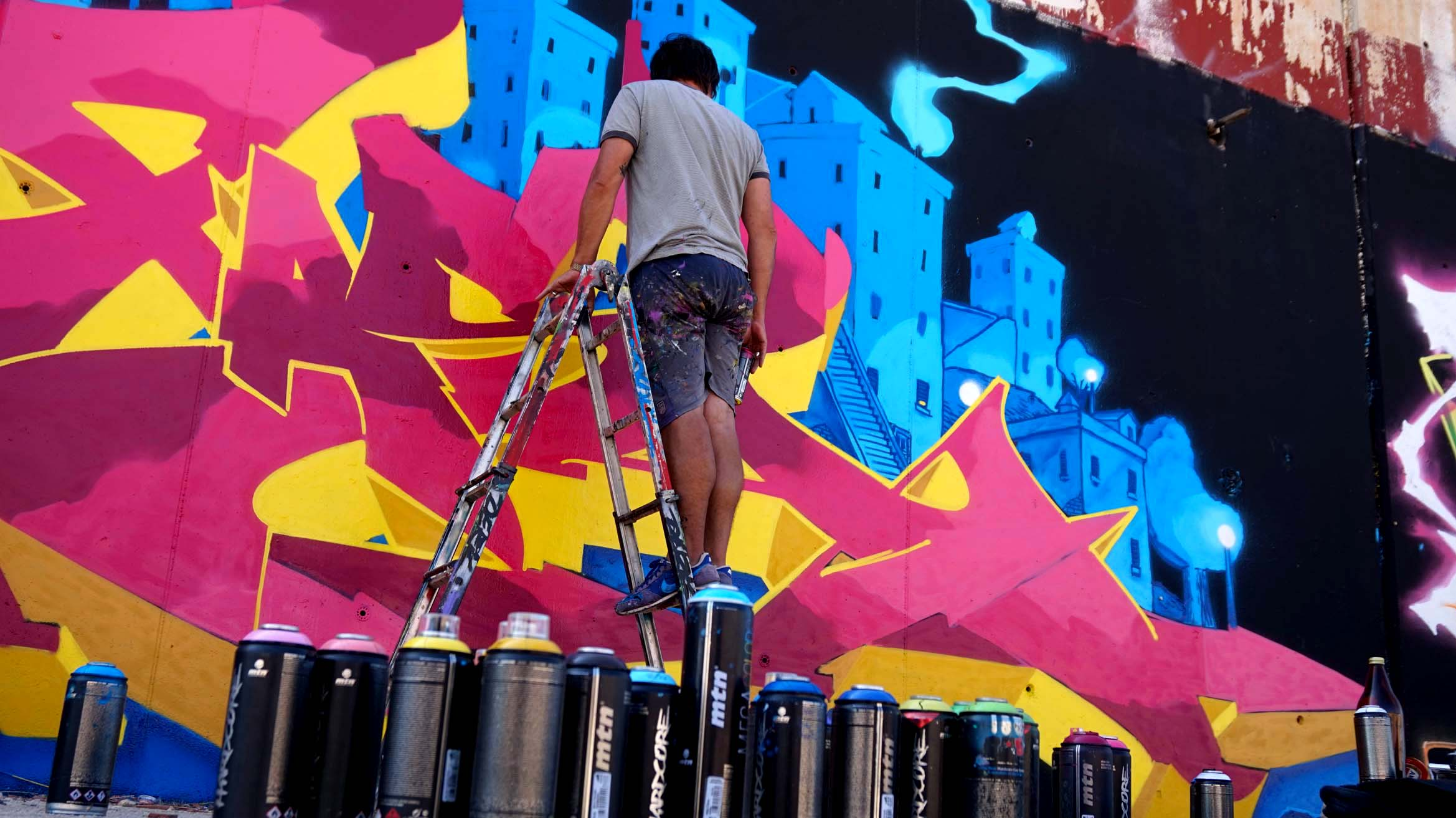 Foto del artista Fasim pintando, realizada el año 2017 con motivo de su cumpleaños junto a los artistas; Pro176, Derk y Emak. Valencia, 2017.